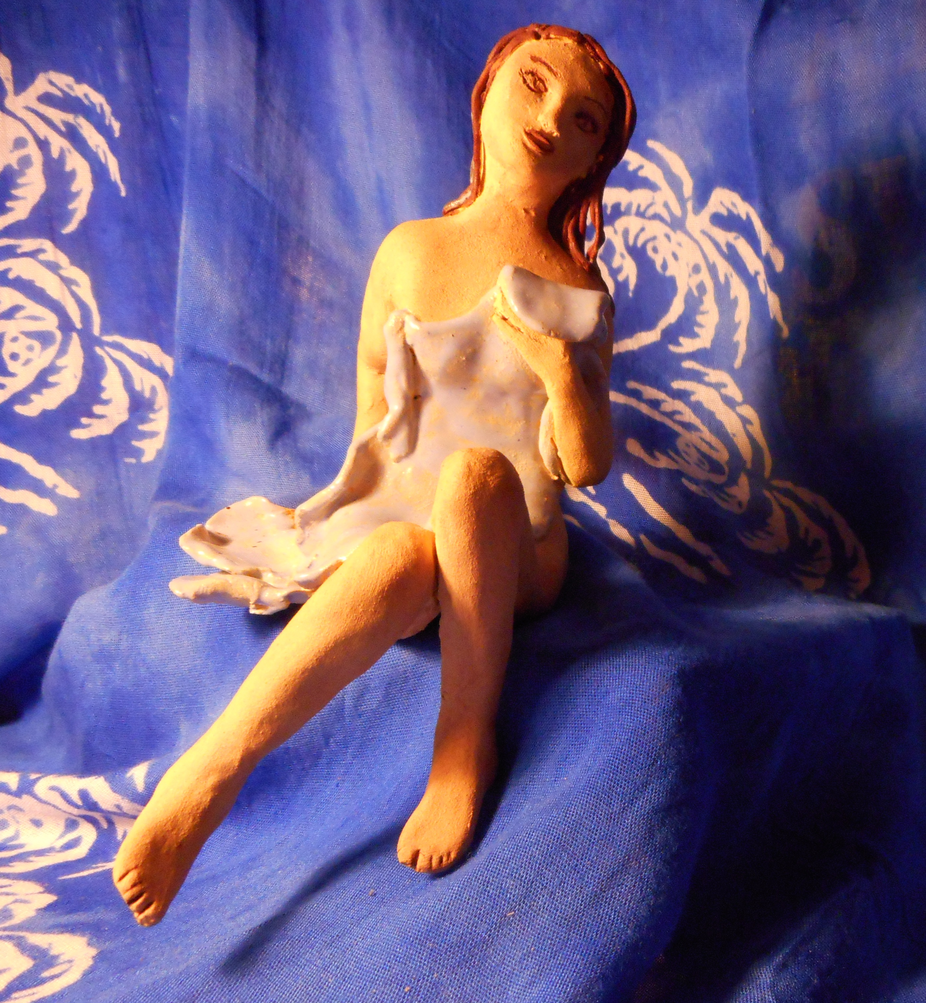 Selkie who is cloak with sealskin made by ceramist Marie F.